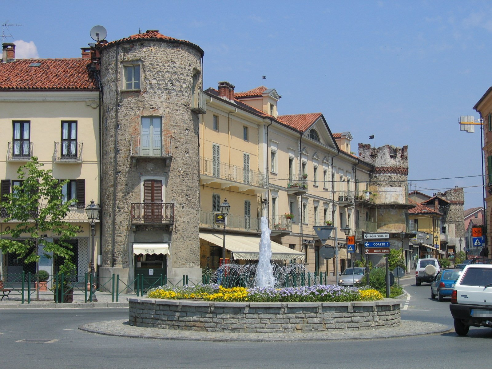 Fontana di Giaveno, in provincia di Torino, Italia.